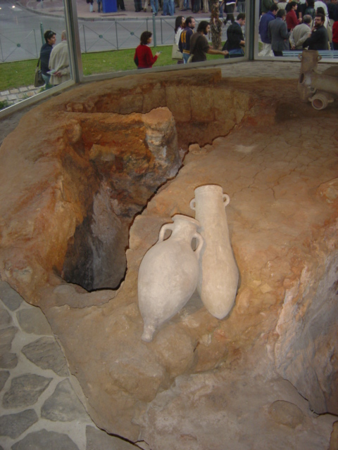 Hornos Púnicos de Torre Alta (Rotonda de los Hornos Púnicos, San Fernando, Cádiz).